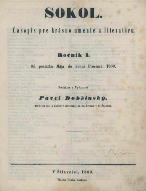 Titulný list slovenského periodika Sokol : Časopis pre krásno, umenie a literatúru z r. 1860.